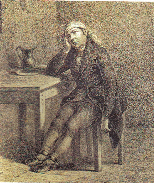 Flag Of Morelos